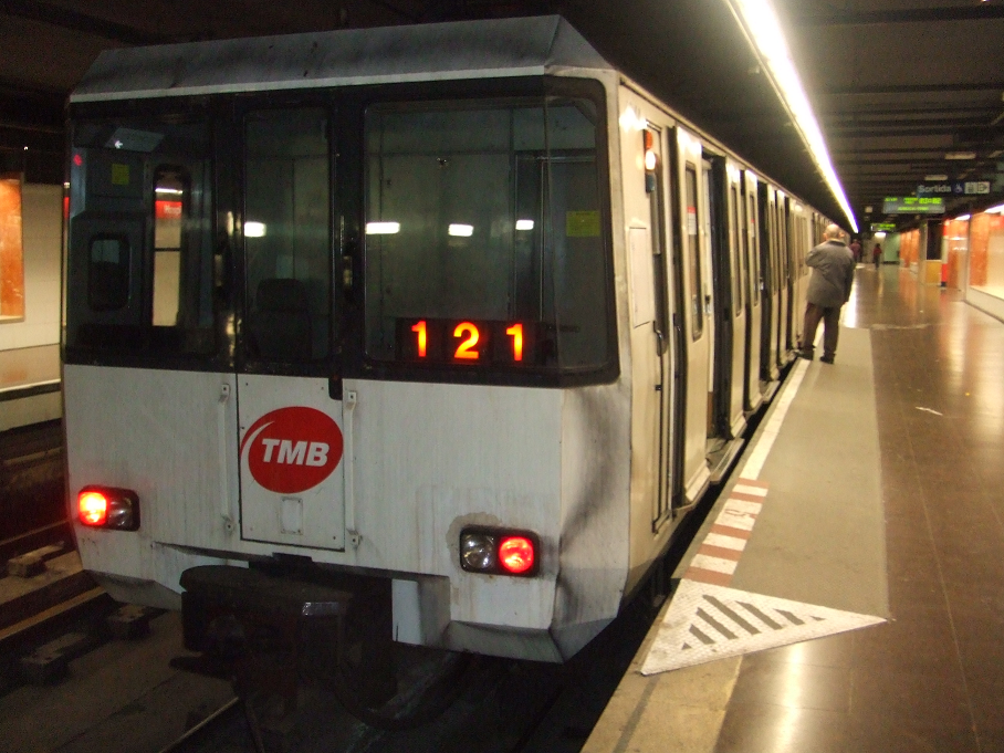 Tren de la serie 4000 del Metro de Barcelona, en Hospital de Bellvitge (L1).